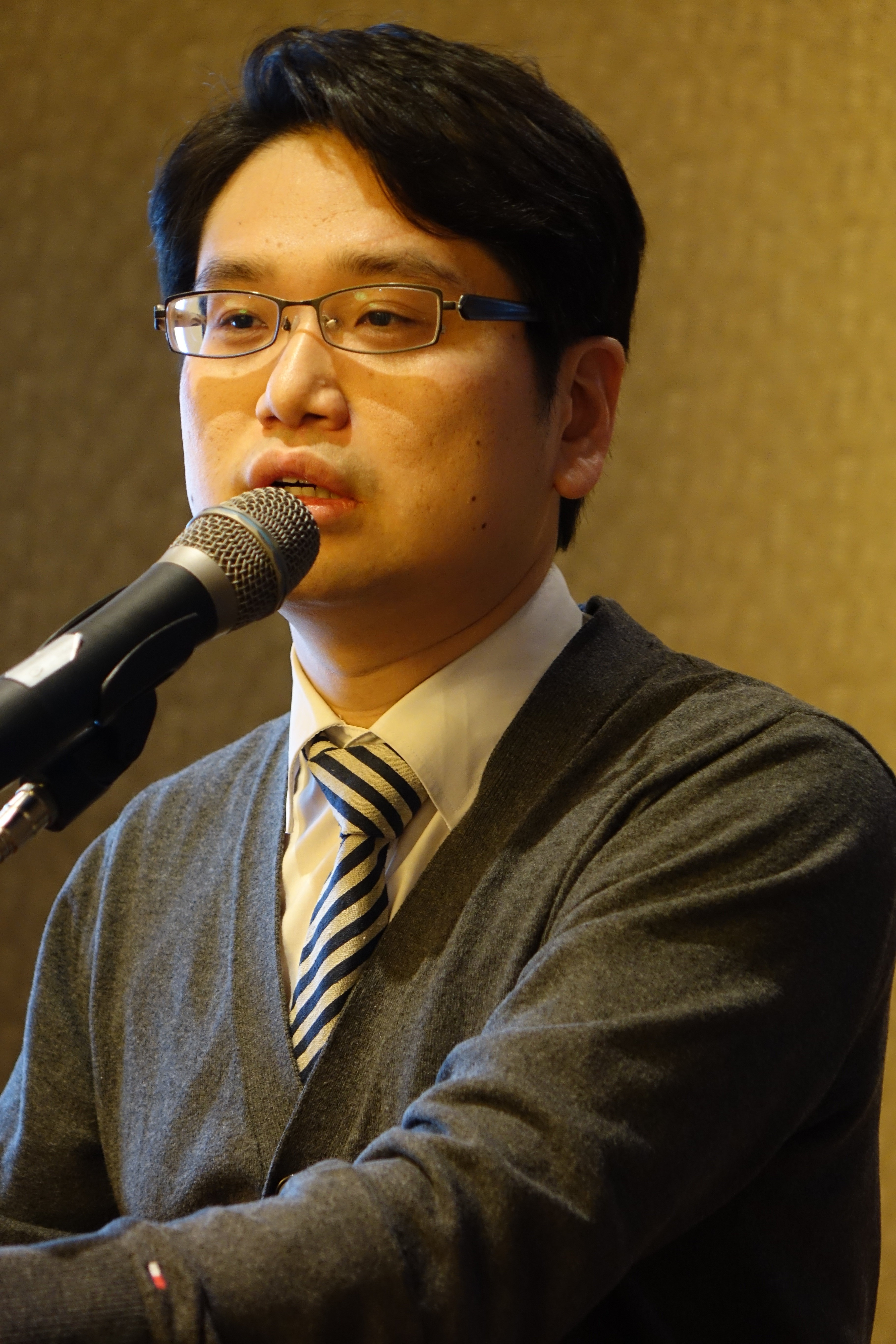 2015년 12월 강원도 평창군 알펜시아 리조트 강릉소방서 부서간 합동 워크숍